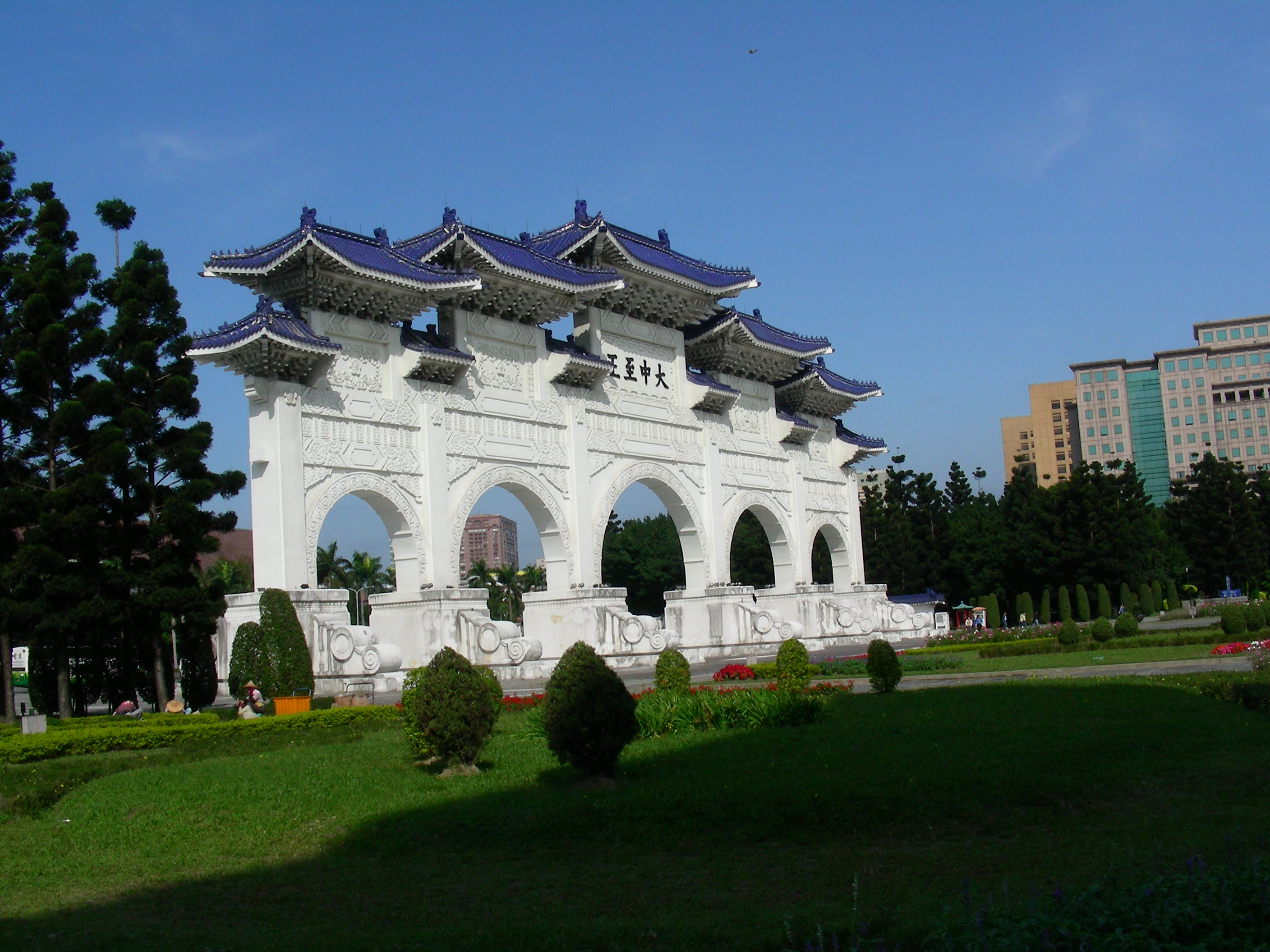 中文（台灣）: 中正紀念堂大中至正牌樓背面。